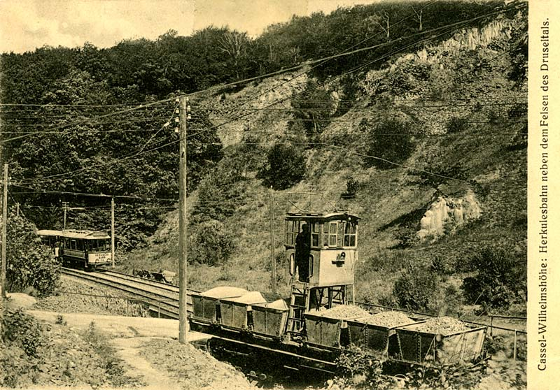 Herkulesbahn;Postkarte aus den de:1910er Jahren